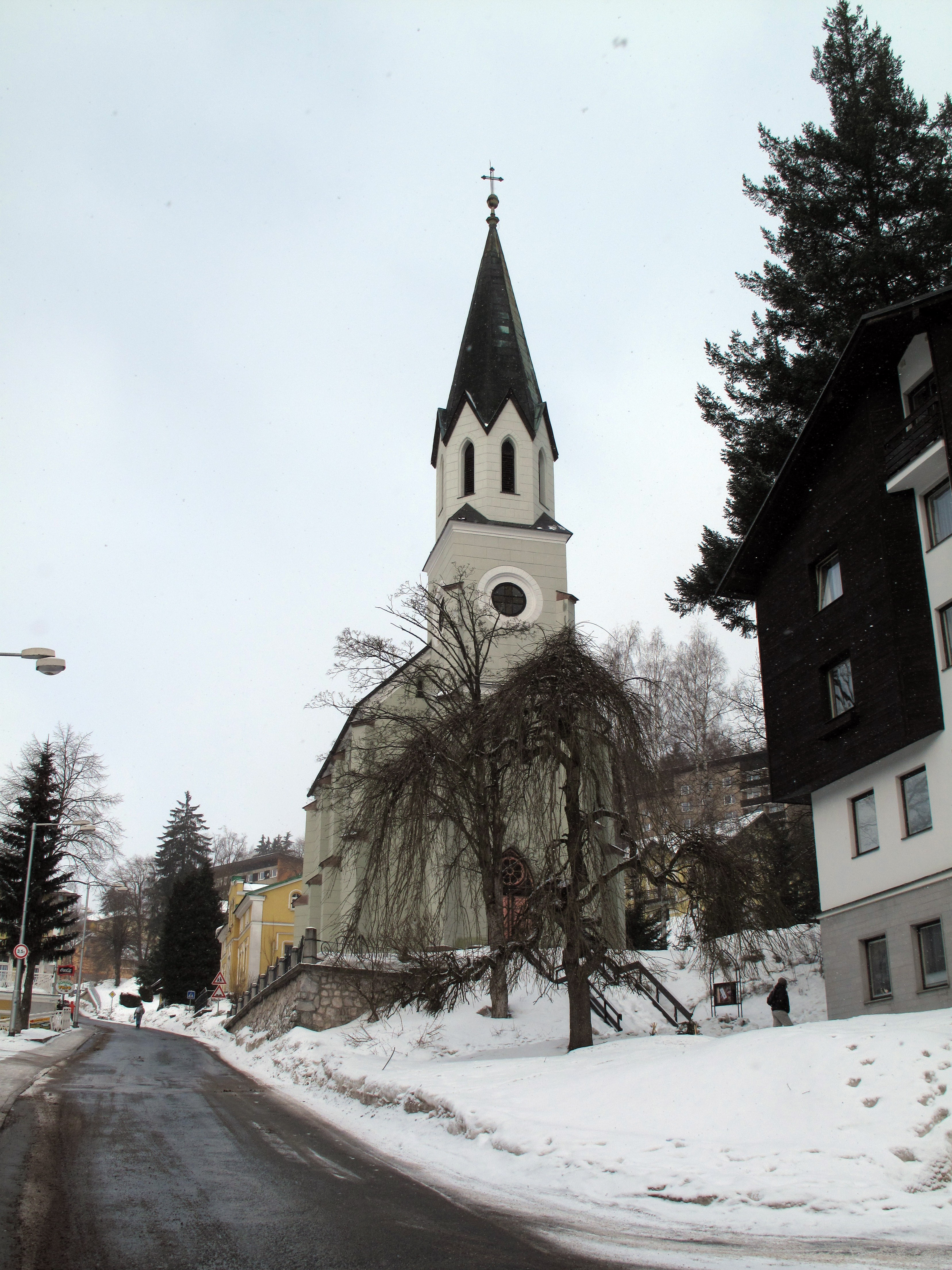 Janské Lázně, kostel